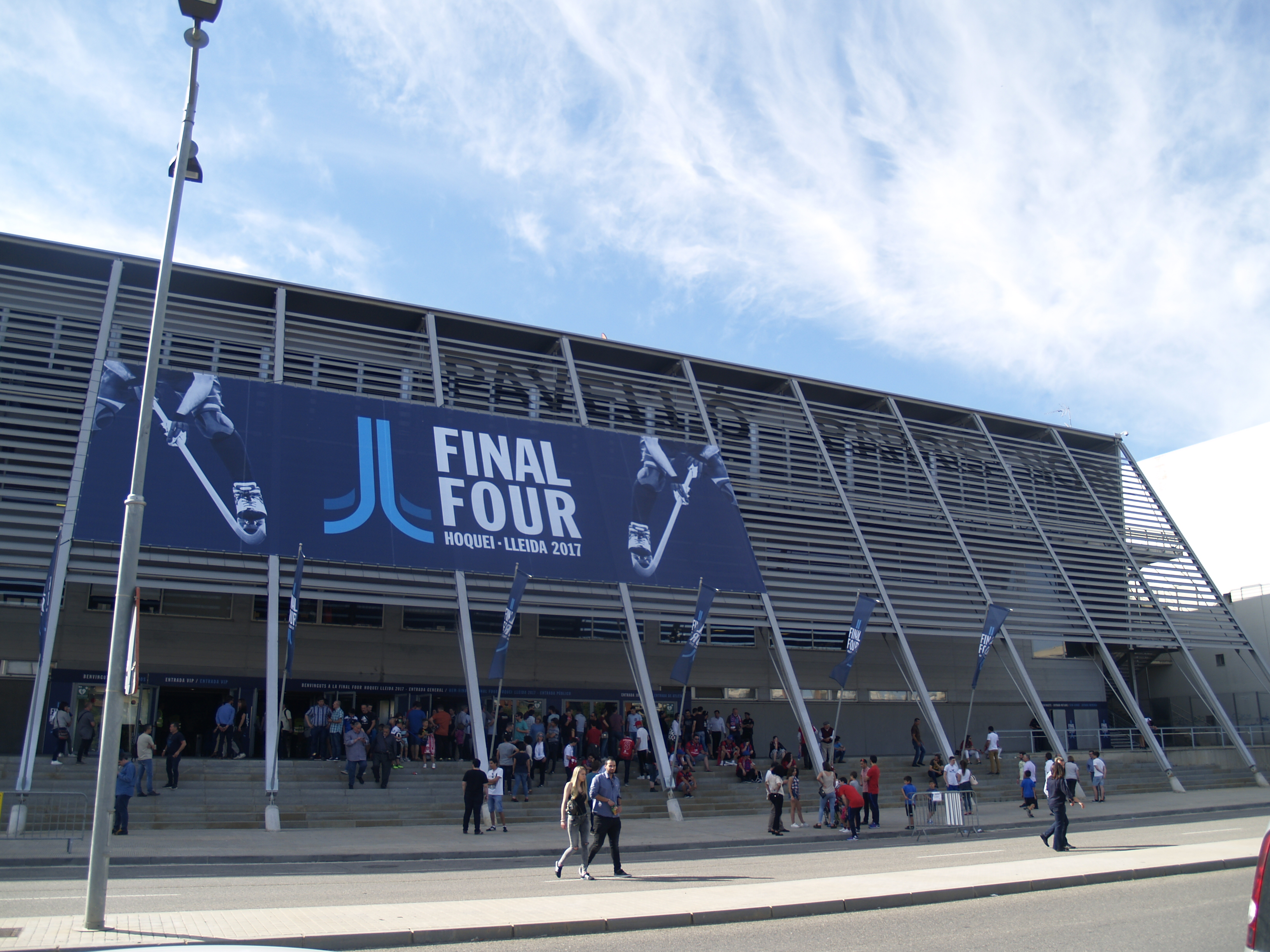 Final de la CERH European League 2016-17 celebrada en Lleida entre el Oliveirense y el Reus.